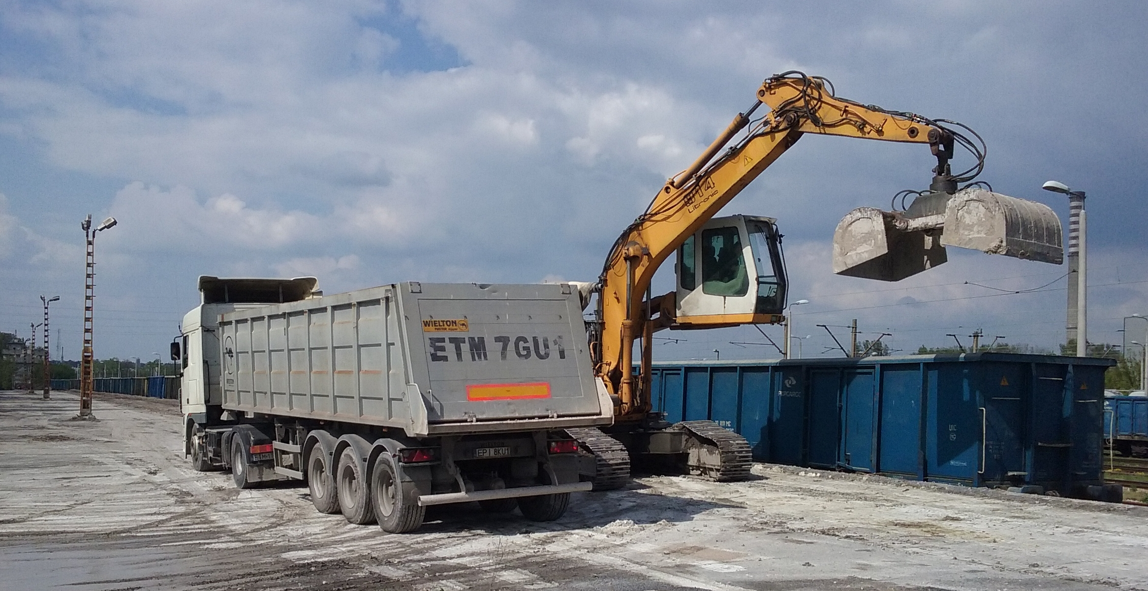 Tomaszów Mazowiecki w województwie łódzkim, PL, EU Przeładunek na platformie cargo za stacją kolejową Tomaszów Mazowiecki, CC0